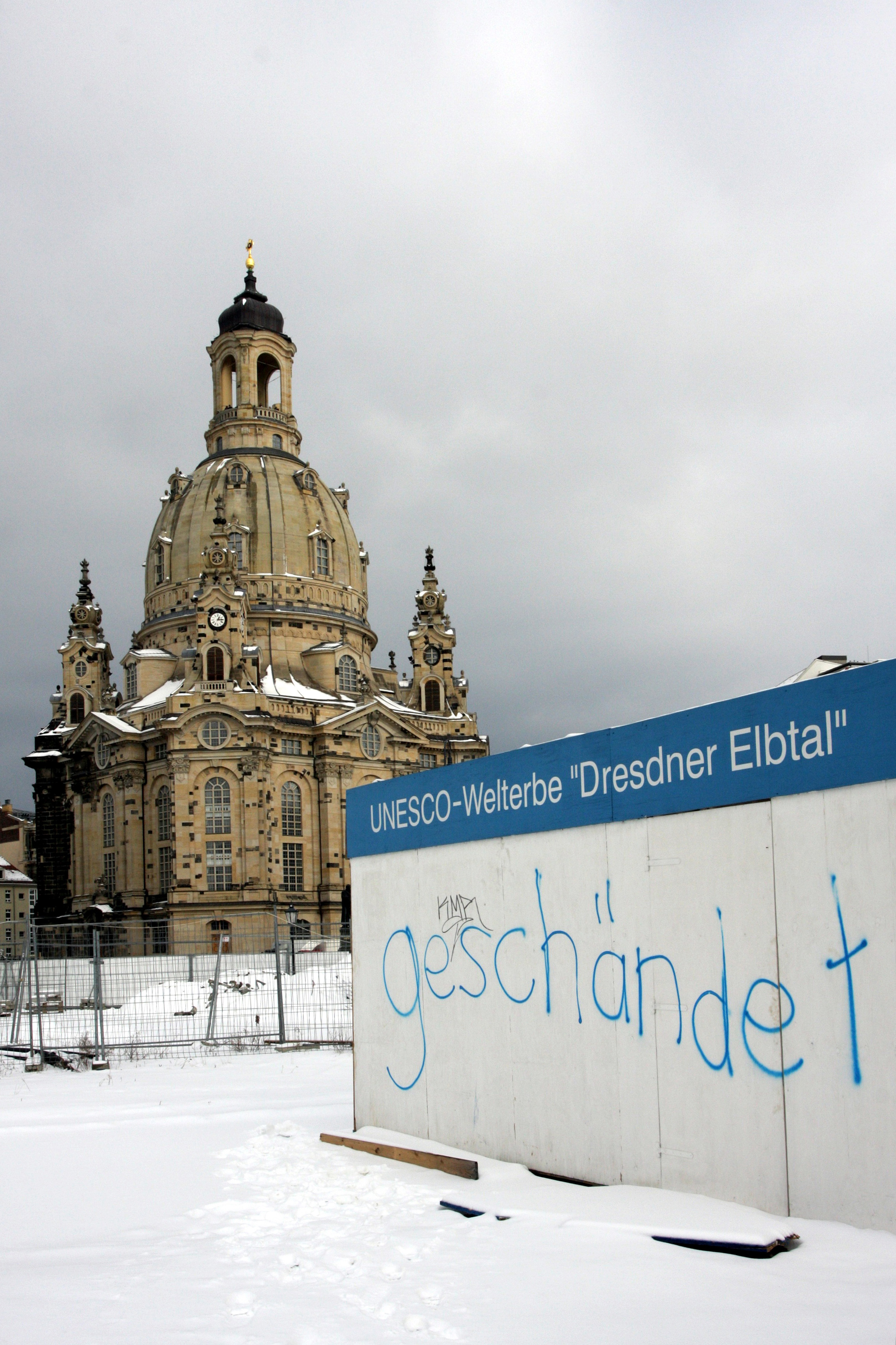 Graffiti als Meinungsäußerung zum Bau der Waldschlösschenbrücke in Dresden